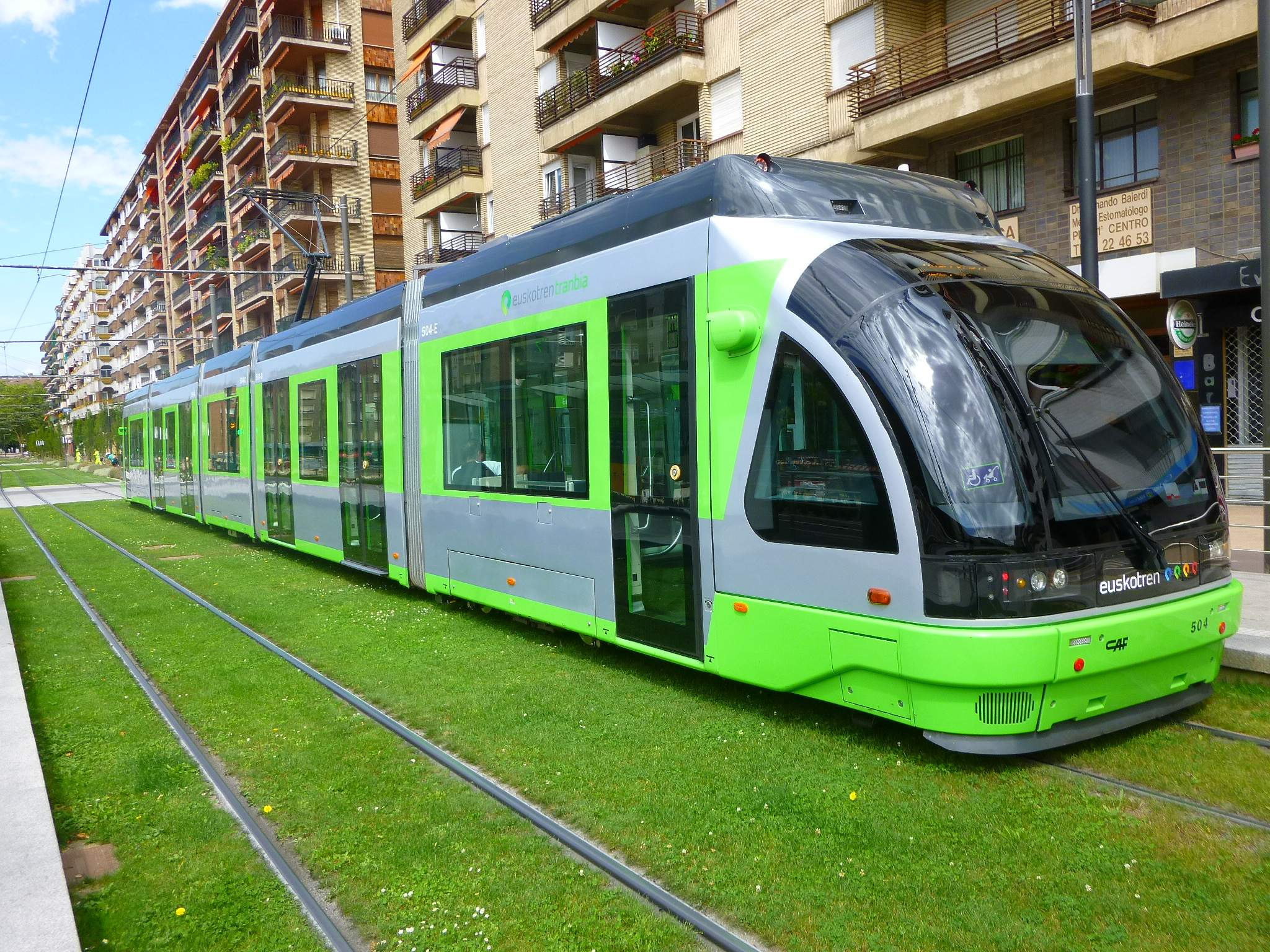 Avenida de Gasteiz, en Vitoria-Gasteiz